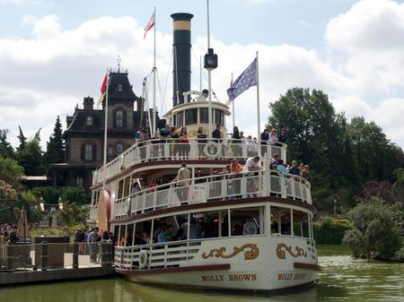 Thunder Mesa Riverboat Landing